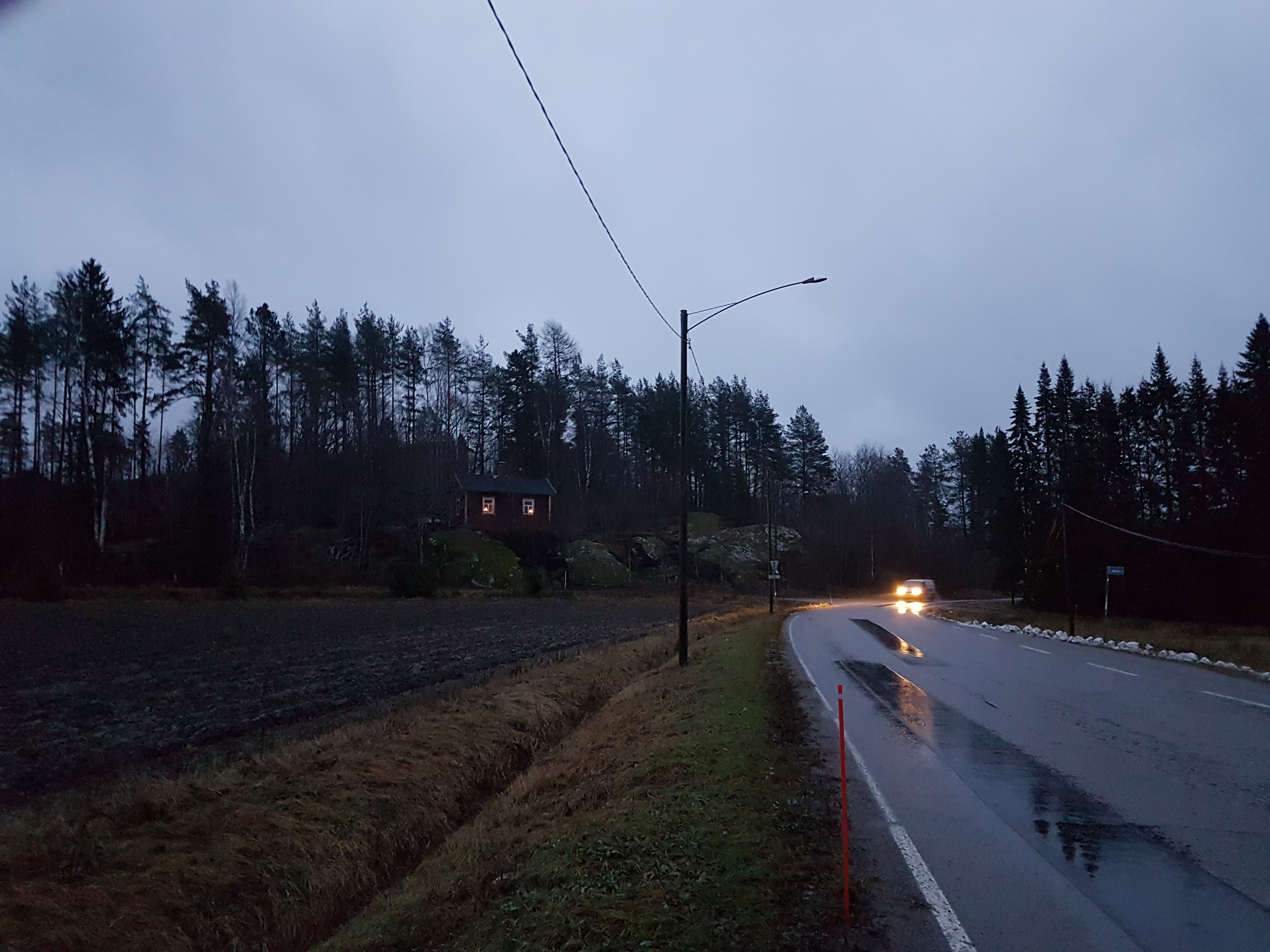 På högra sidan av vägen ses drängstugan och på vä sidan av vägen Stufas